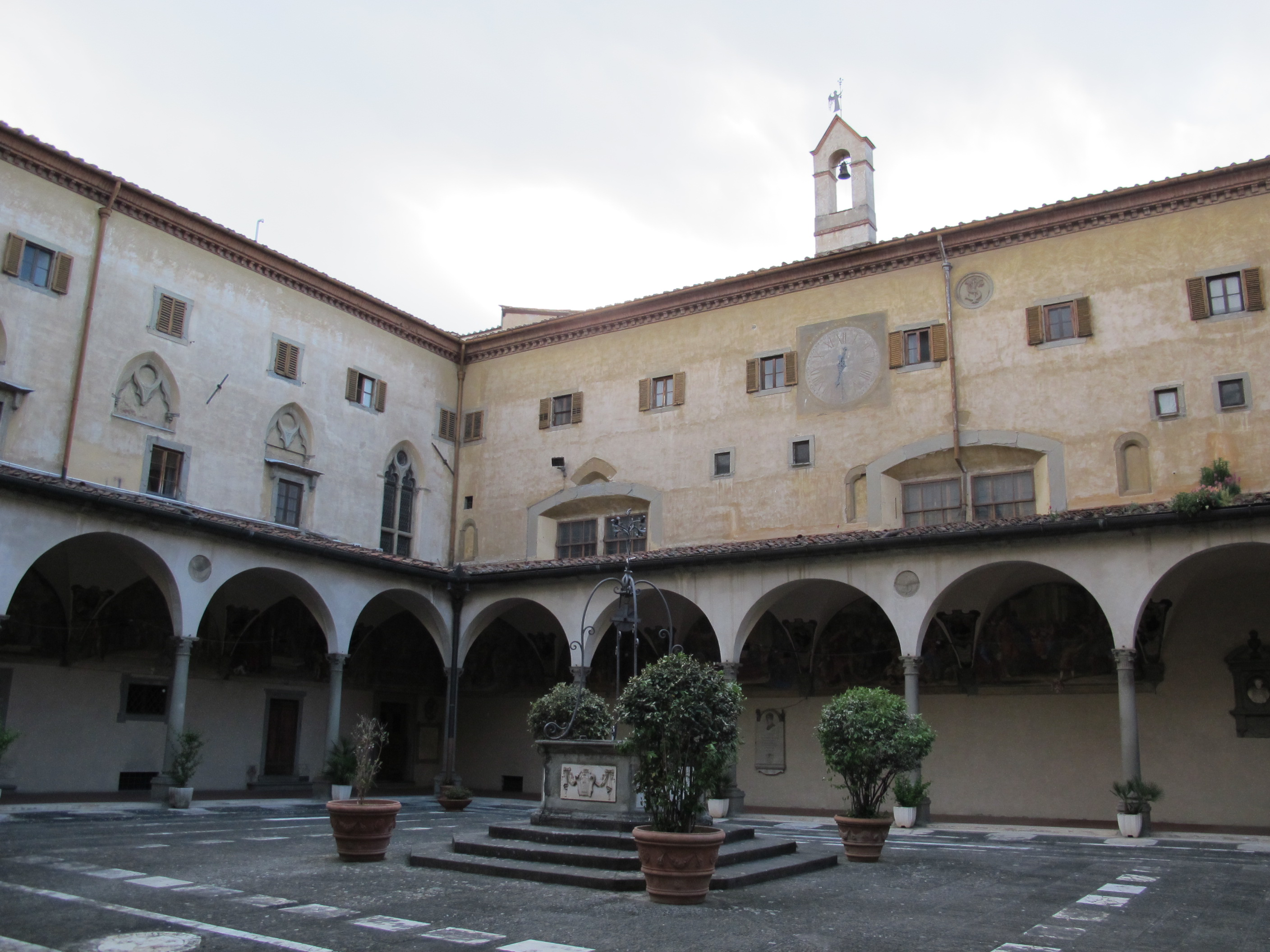 Chiostro della ss annunziata